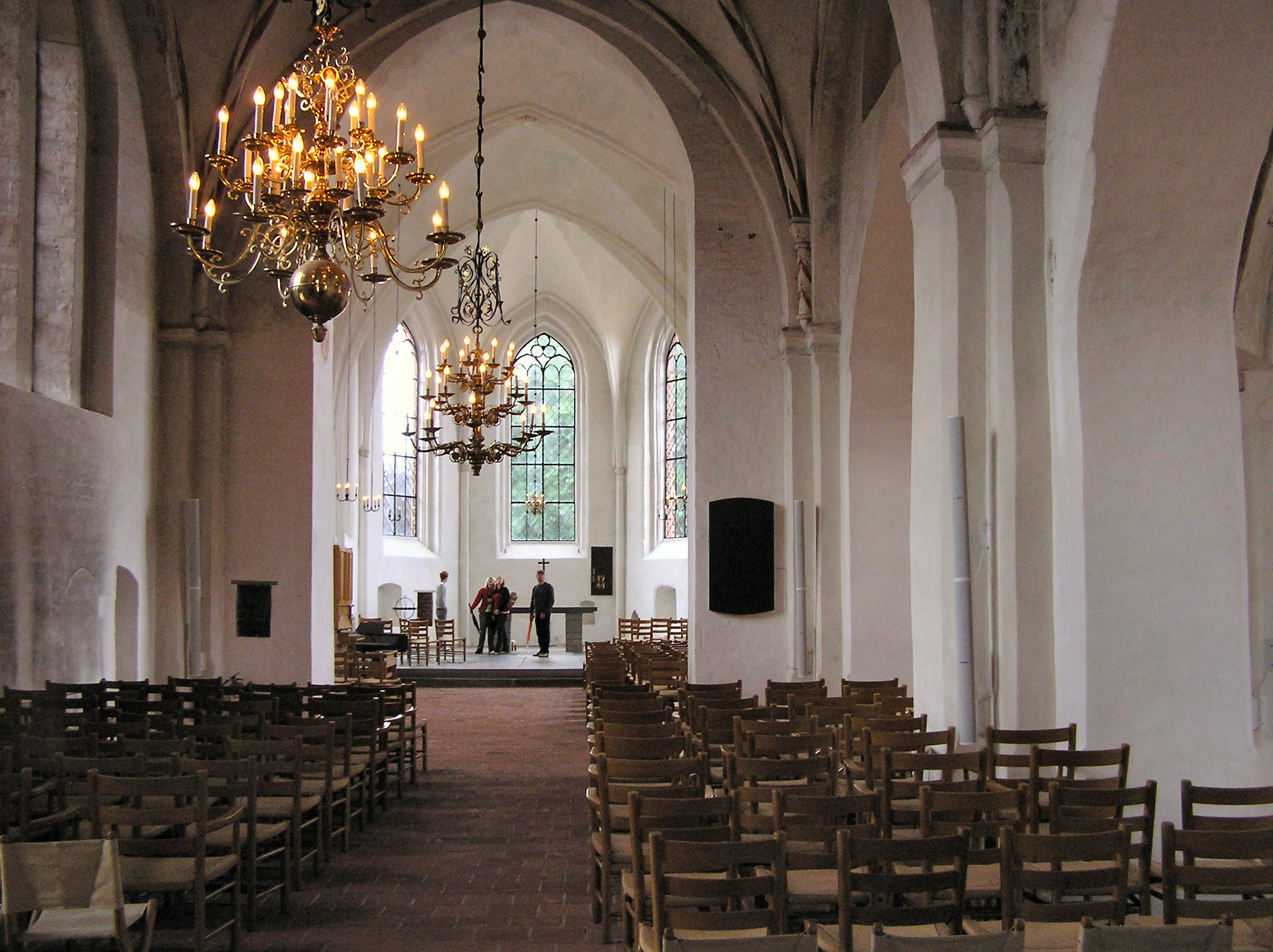 Sankt Petri kirke,Ystad